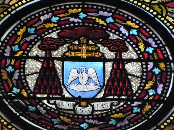 Armes du Cardinal Godefroy Brossay-Saint-Marc (1er Archevêque de Rennes)